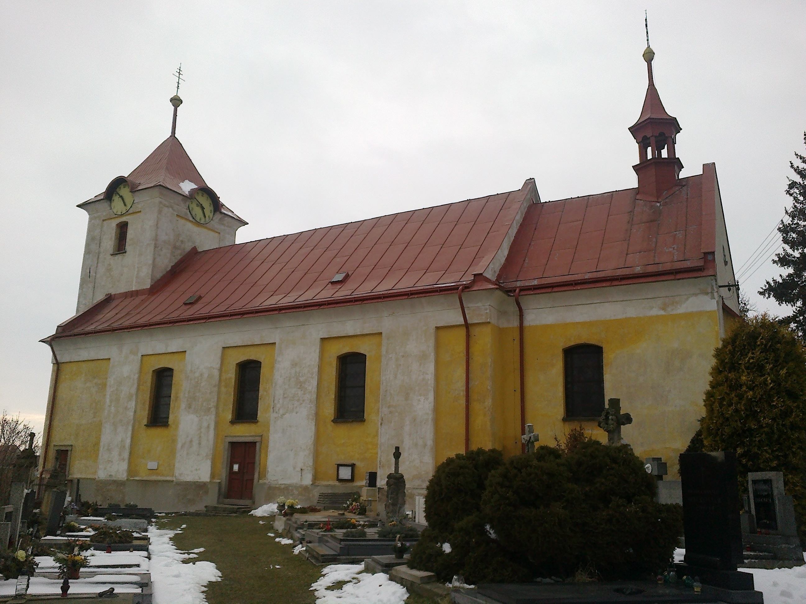 Velká Jesenice - kostel